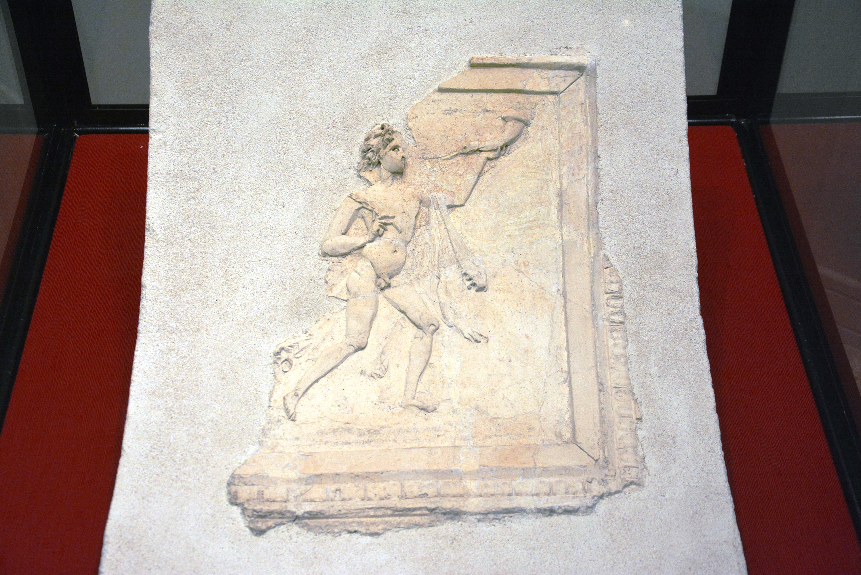 Stucco proveniente da Villa Petraro a Stabiae (Castellammare di Stabia)